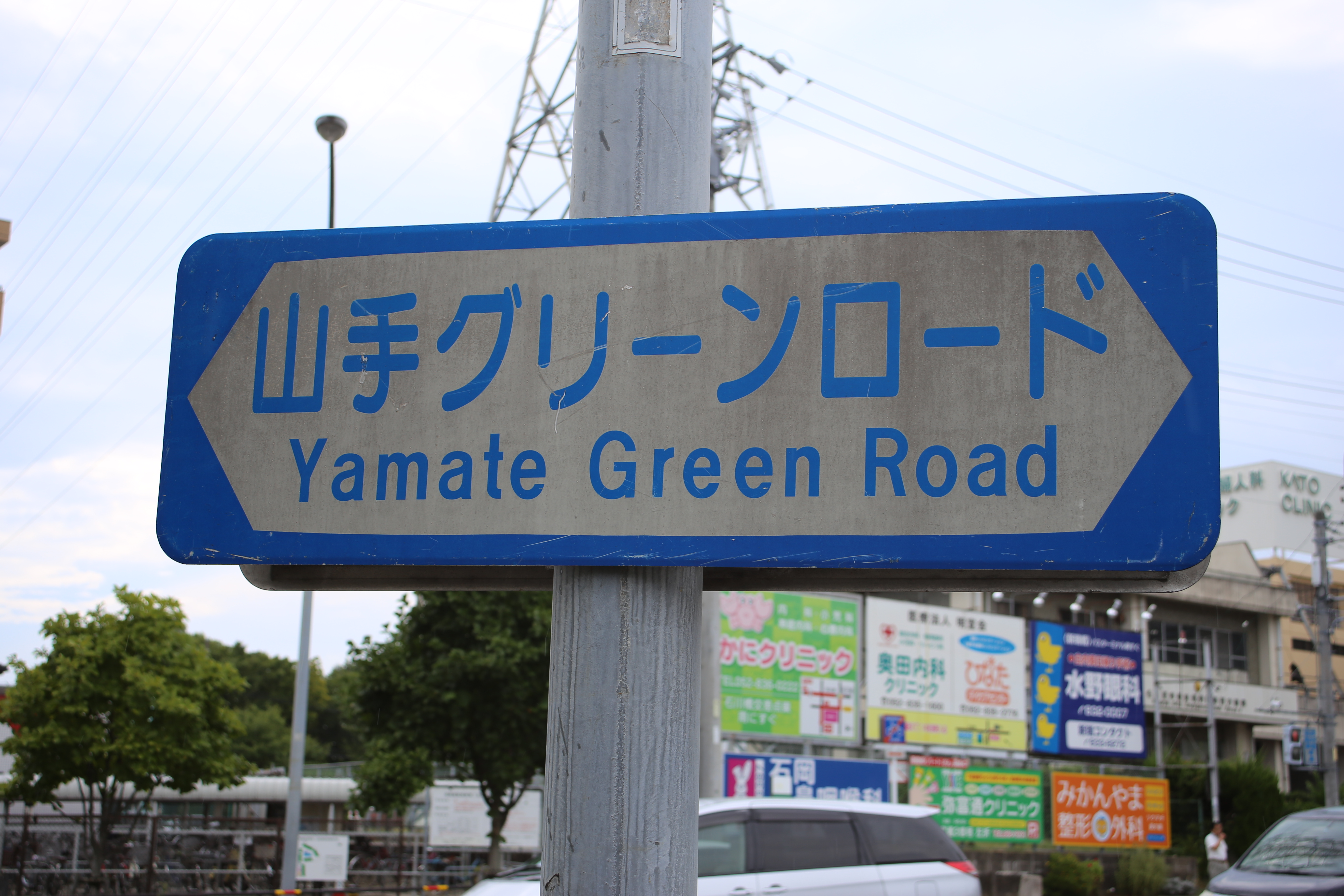 名古屋市瑞穂区の山手グリーンロードの名称表示板